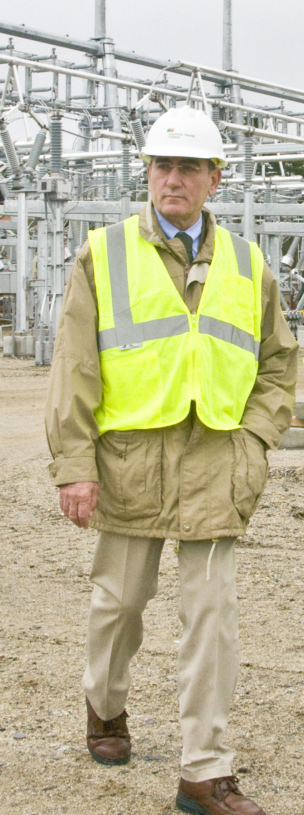 José Ignacio Galán, visitando las obras del Maine Power Realiability Program (EE.UU.)